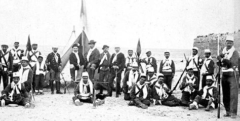 Historia: Soldados que participaron en la batalla de Canchas Blancas, según el Ministerio de Defensa de Bolivia.